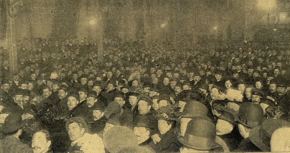 Auszählung der Stimmen bei der Stichwahl im Wahlkreis Potsdam-Osthavelland. Reichstagswahl 1912